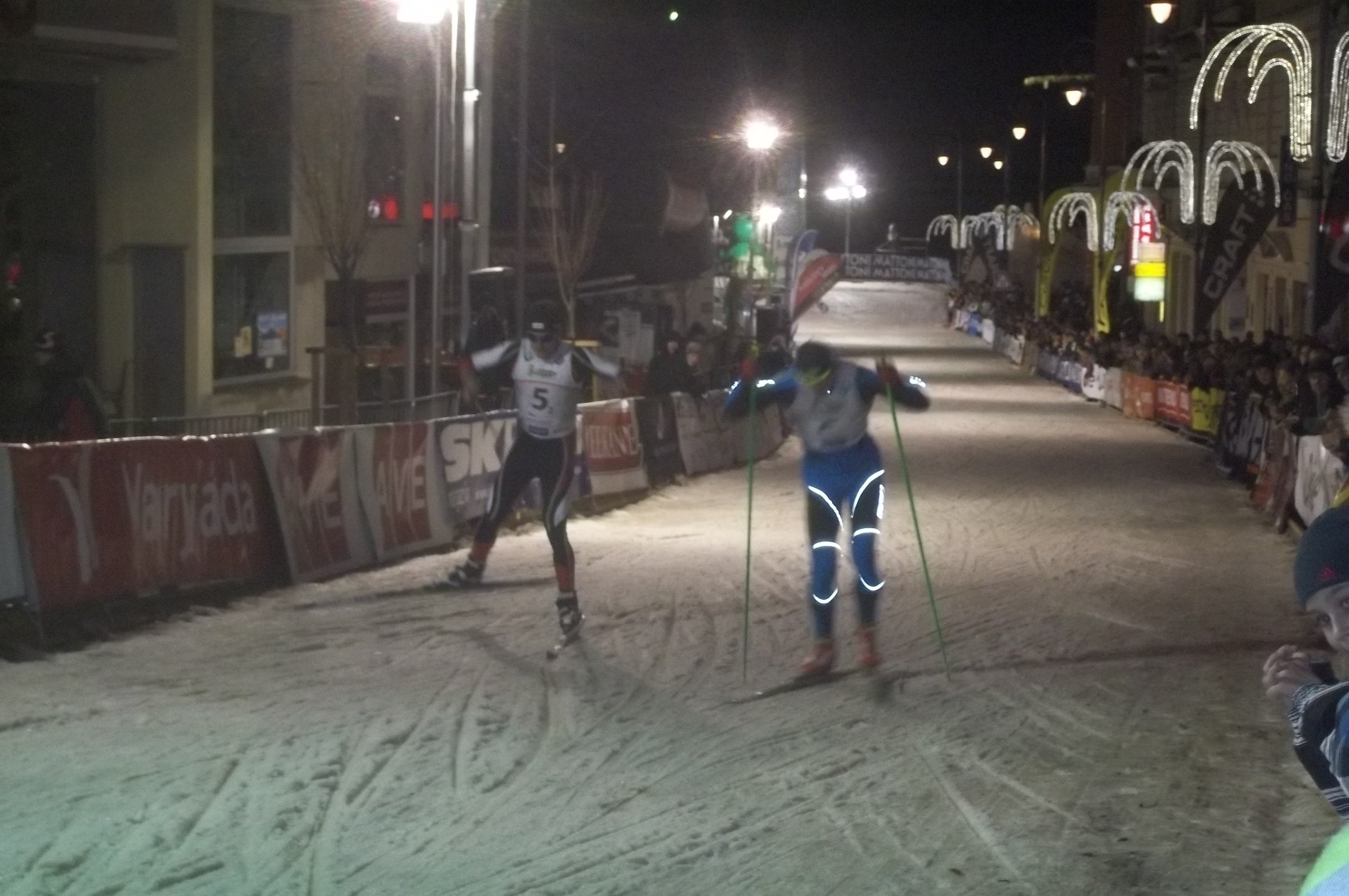 Karlovy Vary